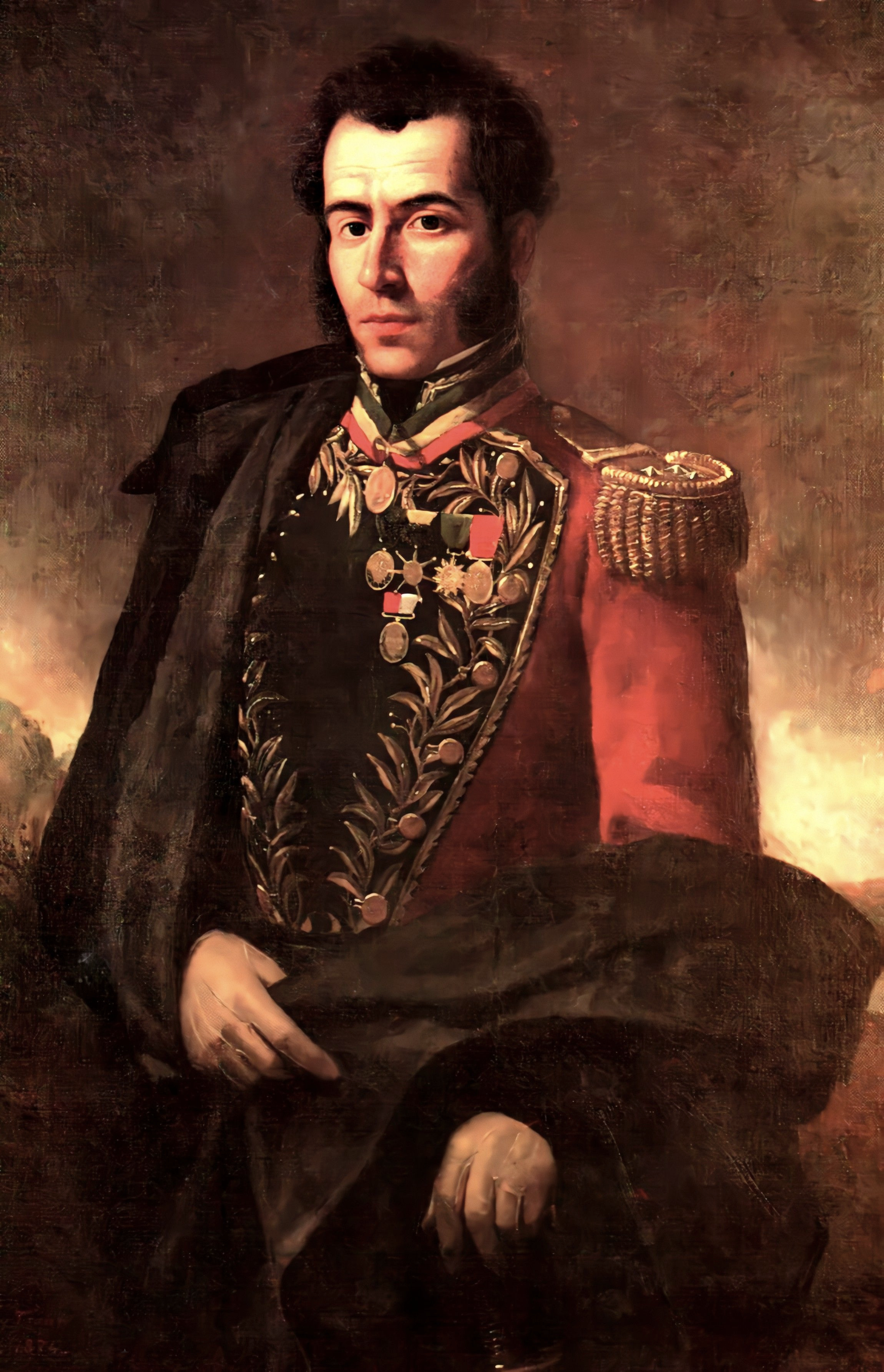 Antonio Jose de Sucre.Salon Eliptico del capitolio Nacional. Oleo sobre tela. Palacio Federal Legislativo, Caracas - Venezuela